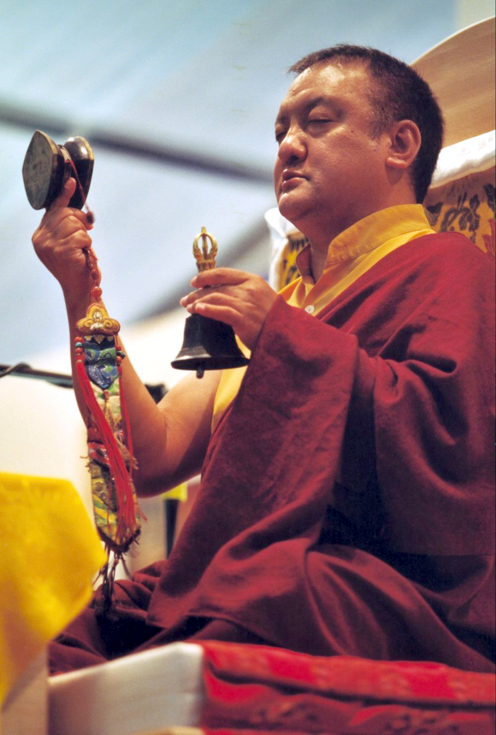 Shamarpa bei einer Einweihung in Kassel Bettina Haffter Hammerstrasse 9 Ch - 8008 Zürich